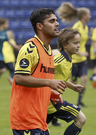 Daniel Norouzi ved Brøndby Dagen 2012, hvor unge Brøndby-fans har mulighed for at møde superligaspillerne.